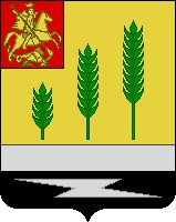 Герб посёлка Барыбино Домодедовского района